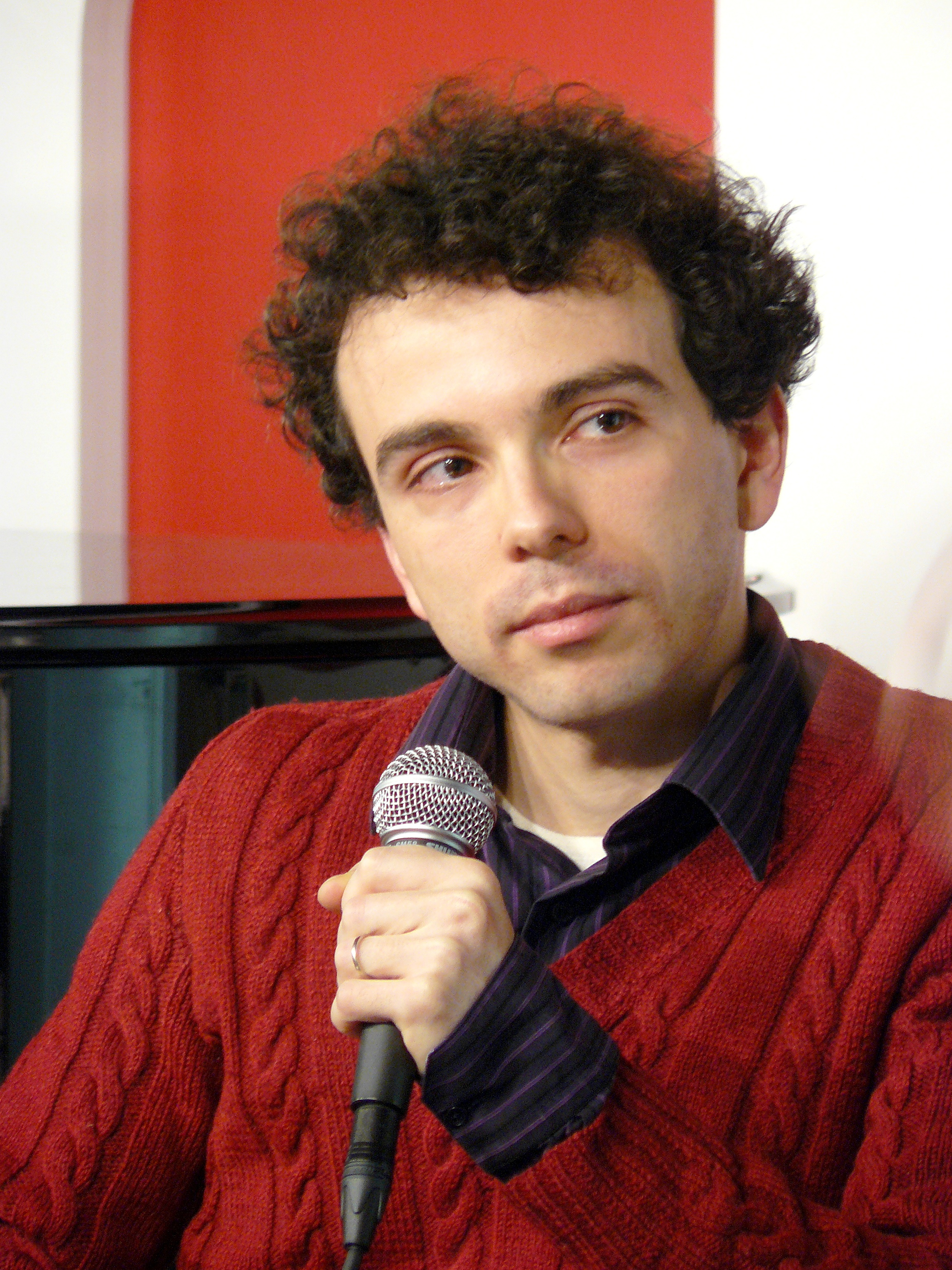 Damien Luce (né en 1978), lors de la présentation d'un nouvel enregistrement à la FNAC Montparnasse, le 12 février 2010.